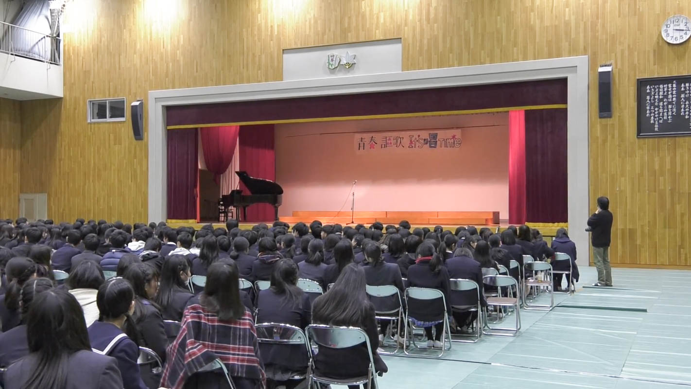 東京都立竹早高等学校、合唱コンクールが行われる体育館